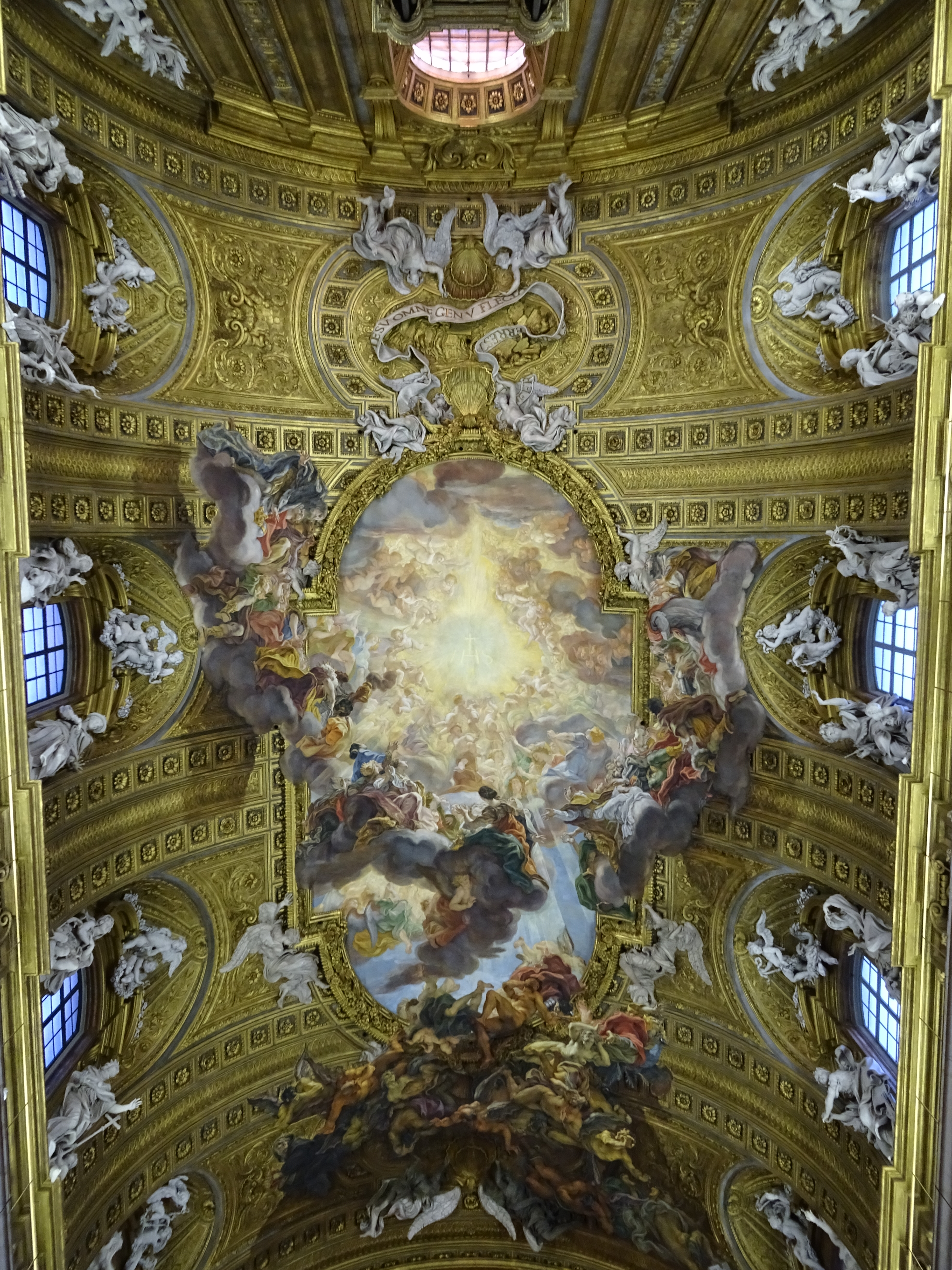 gewelf ontworpen door Baciccio: Triomf van de Naam van Jezus